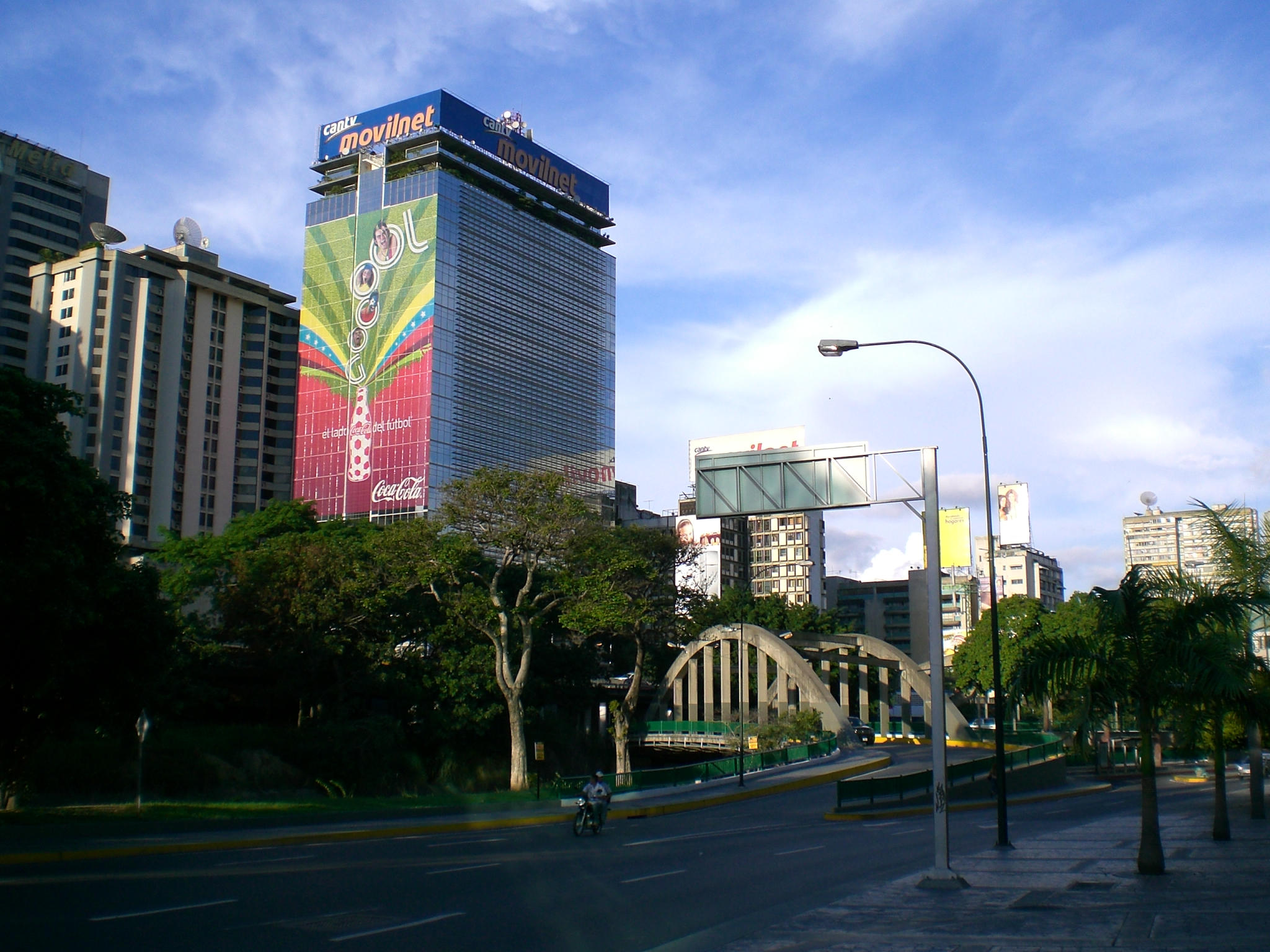 Bello Monte, Caracas, Venezuela.